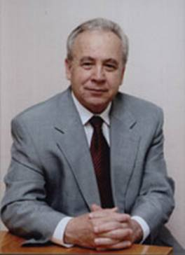 Тишко Федір Олексійович — академік АН вищої школи України